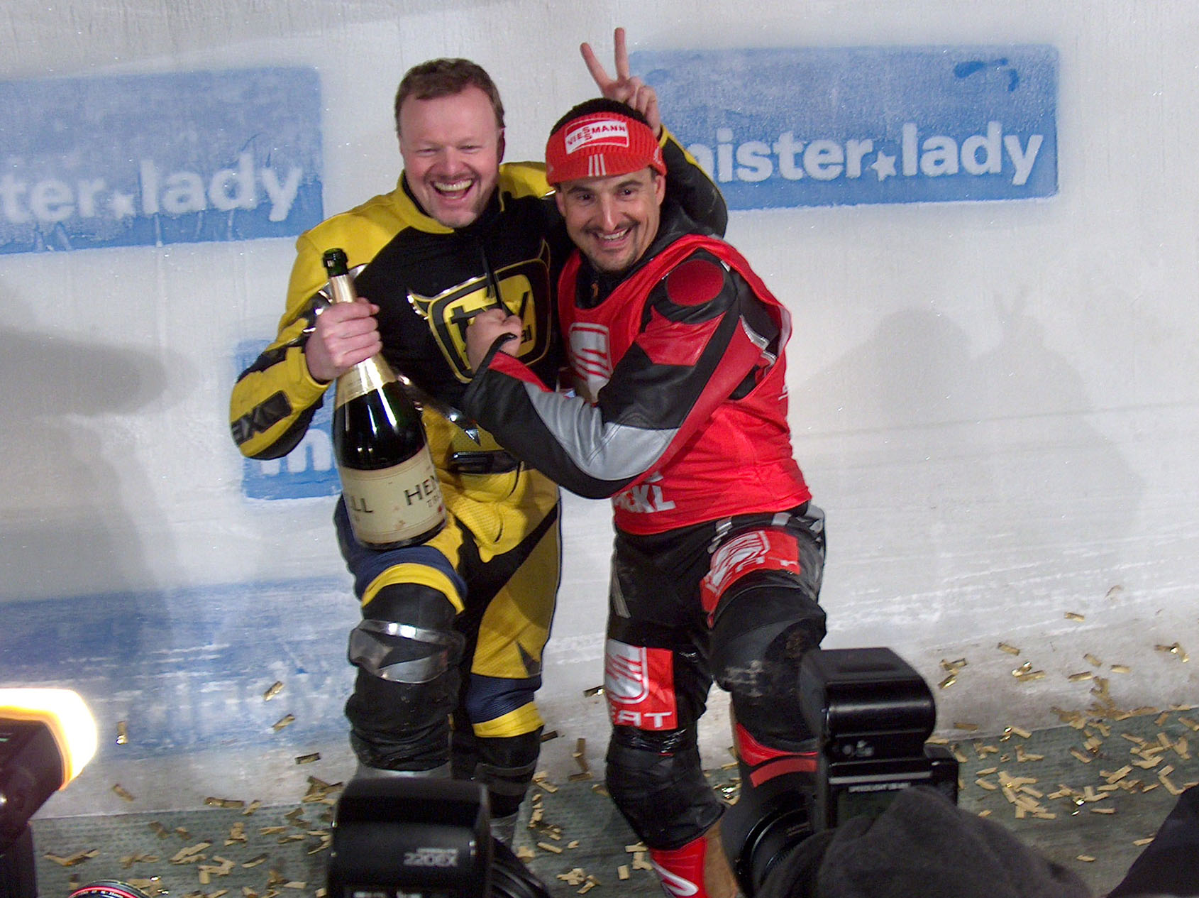 Stefan Raab und George Hackl bei der WokWM 2008